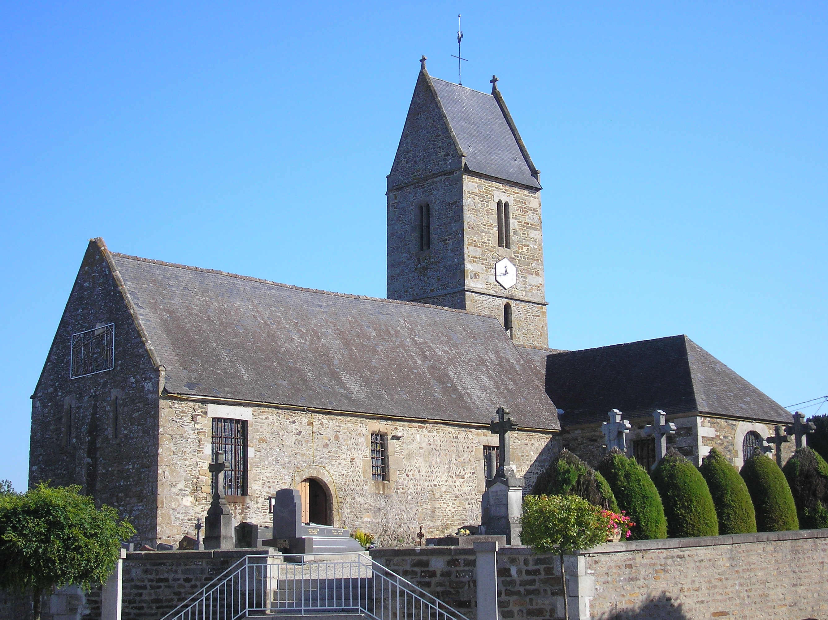 La Graverie (Normandie, France). L'église Notre-Dame.